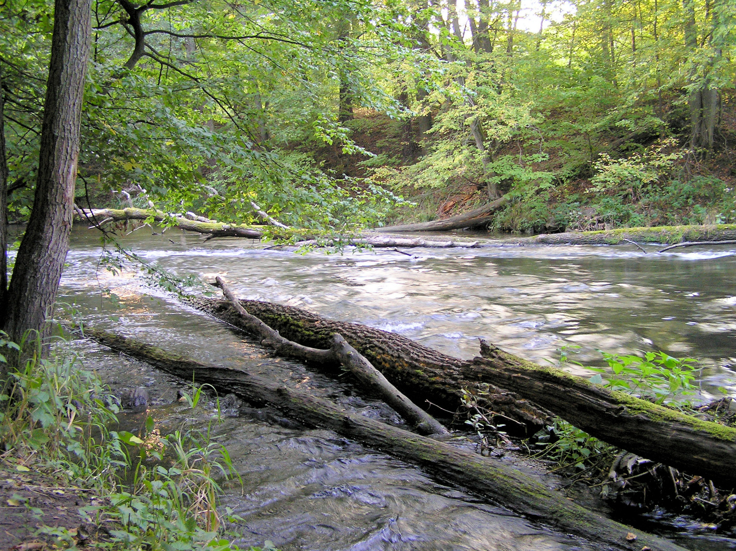 Piekiełko - uroczysko w przepływie Brdy